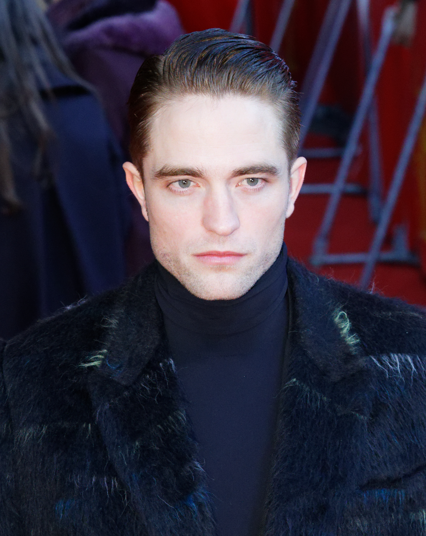 Robert Pattinson bei der Premiere von Die versunkene Stadt Z im Zoo Palast bei der Berlinale 2017